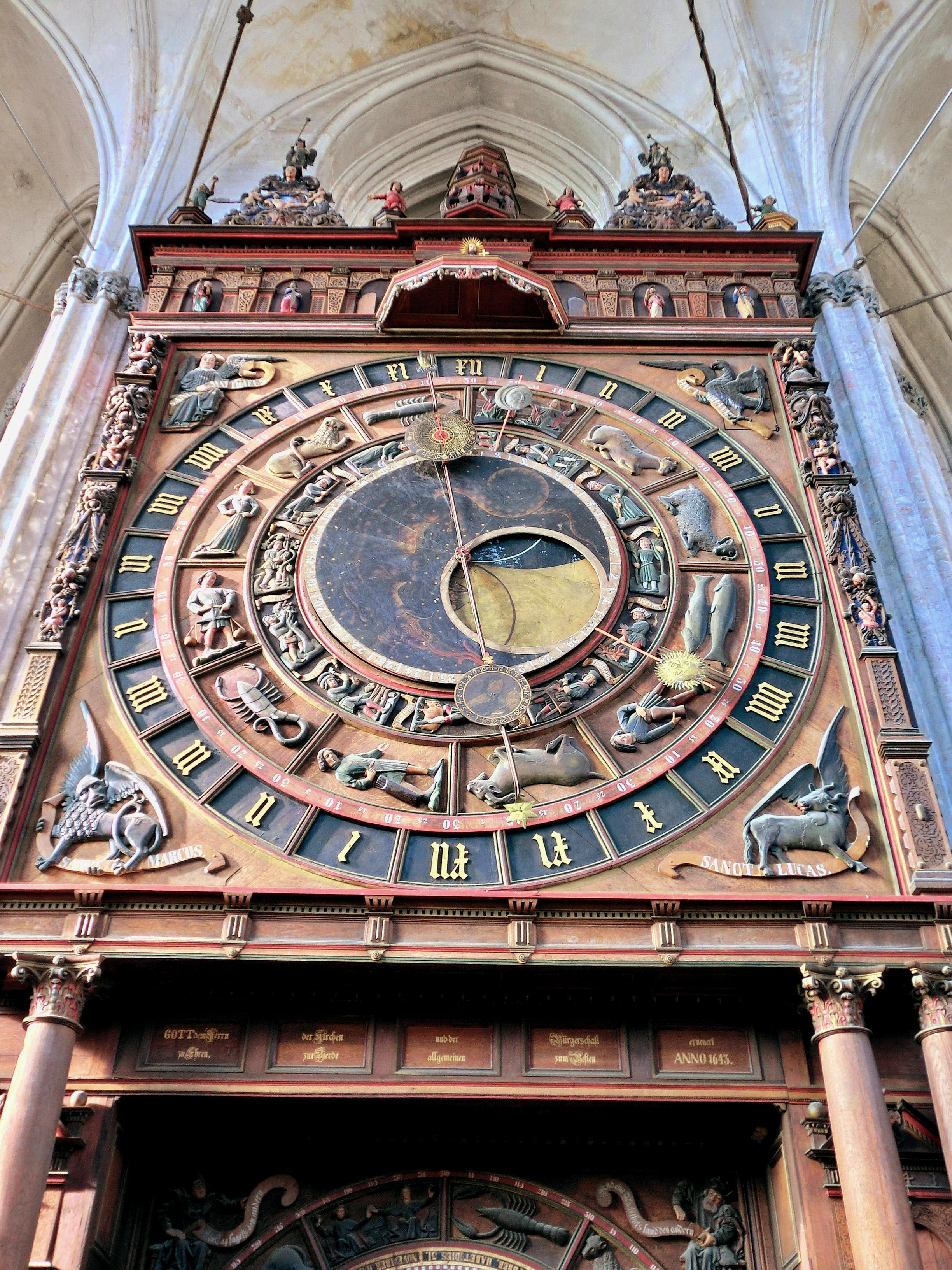 Astronomische Uhr in der Marienkirche Rostock